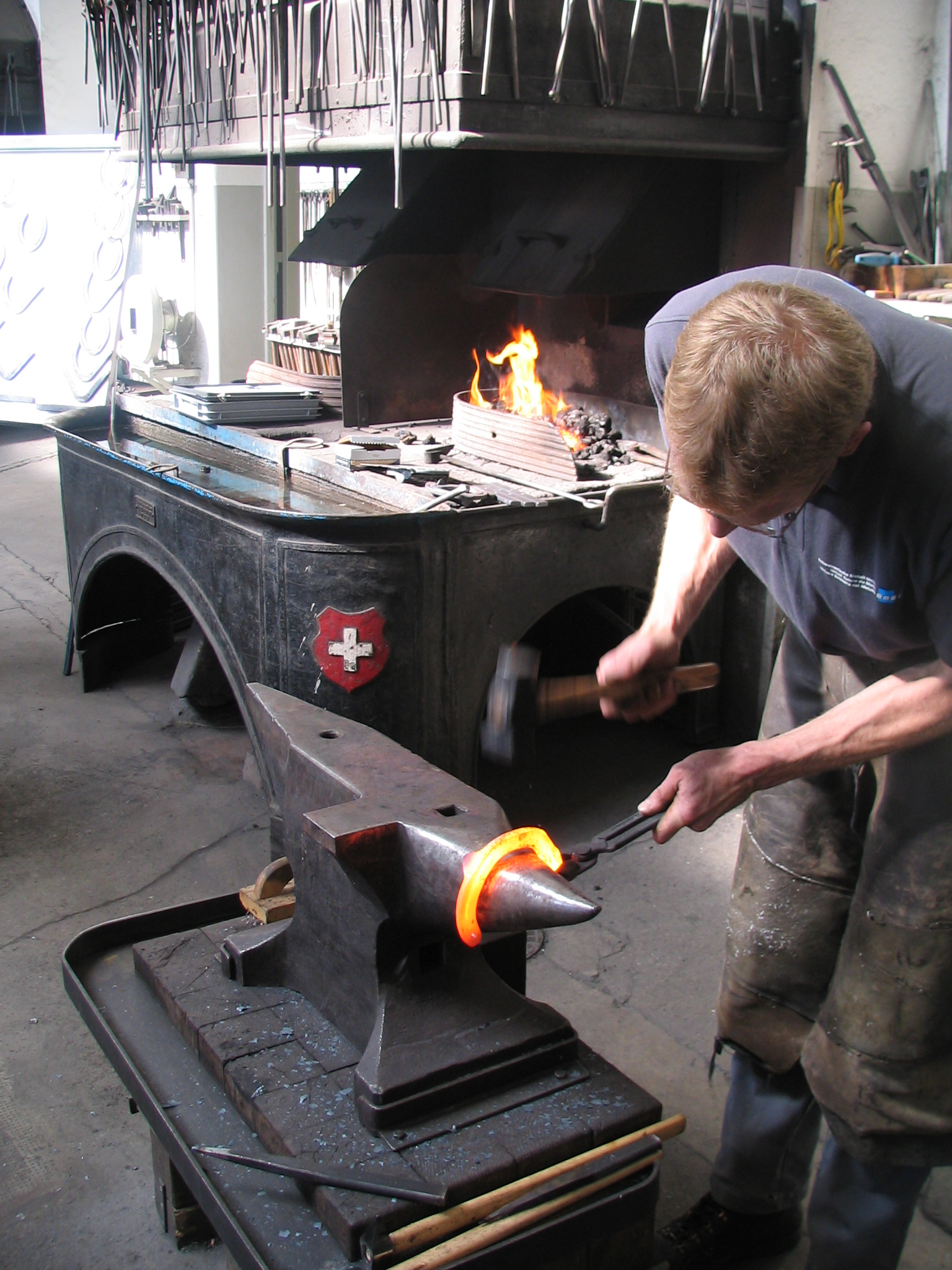 Ehemalige Pferdekuranstalt